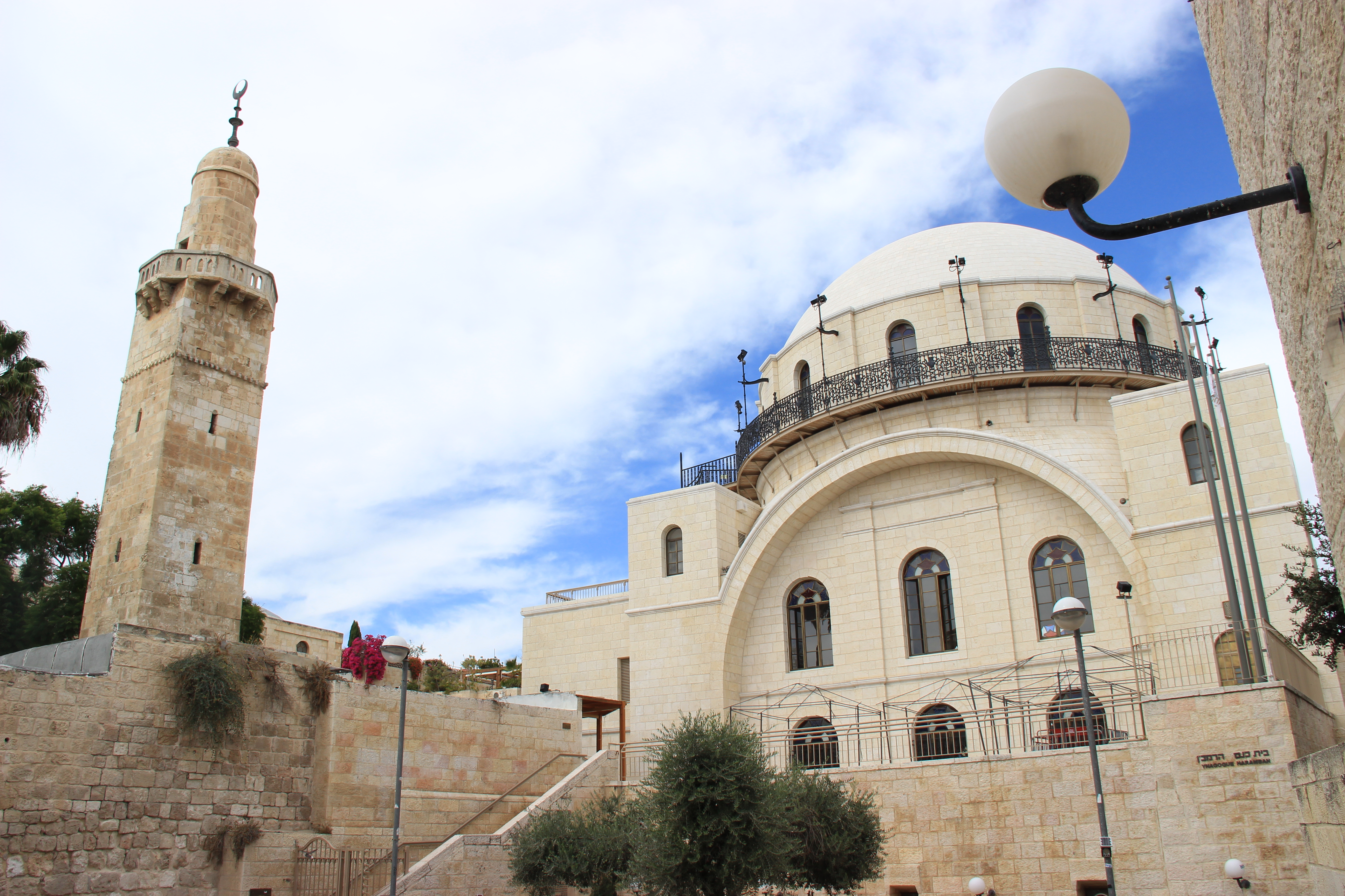 מוזיאון חצר היישוב הישן הוא מוזיאון אתנוגרפי ברובע היהודי בעיר העתיקה בירושלים המשקף את אורח החיים המסורתי של אנשי "היישוב הישן" במאתיים השנים שקדמו לנפילת הרובע היהודי במלחמת העצמאות.